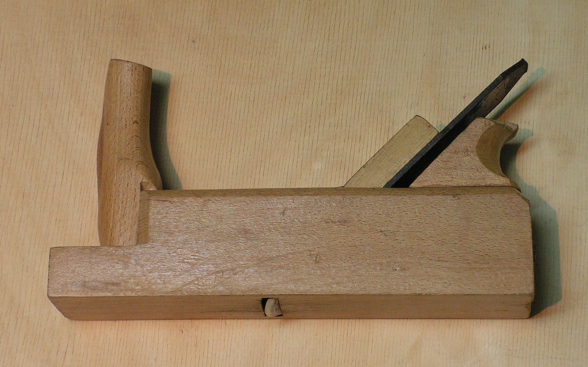 Strug zdzierak.